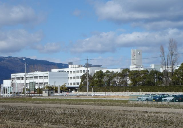 岐阜経済大学 (岐阜県大垣市)